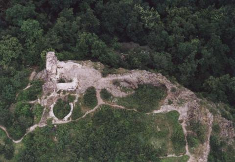 A vár romjai dél felől.